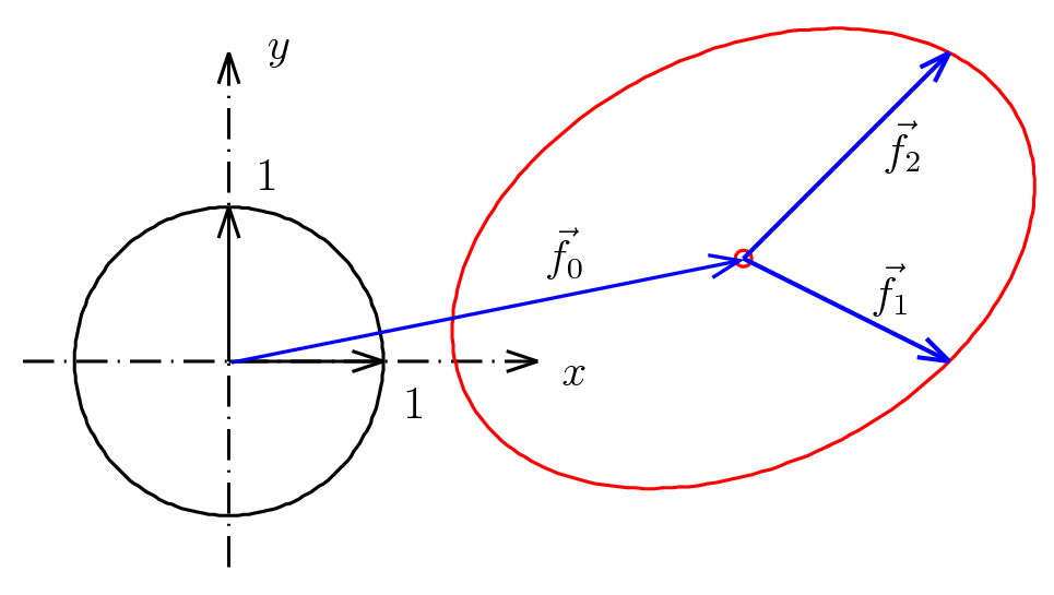 Ellipse: affines Bild des Einheitskreises